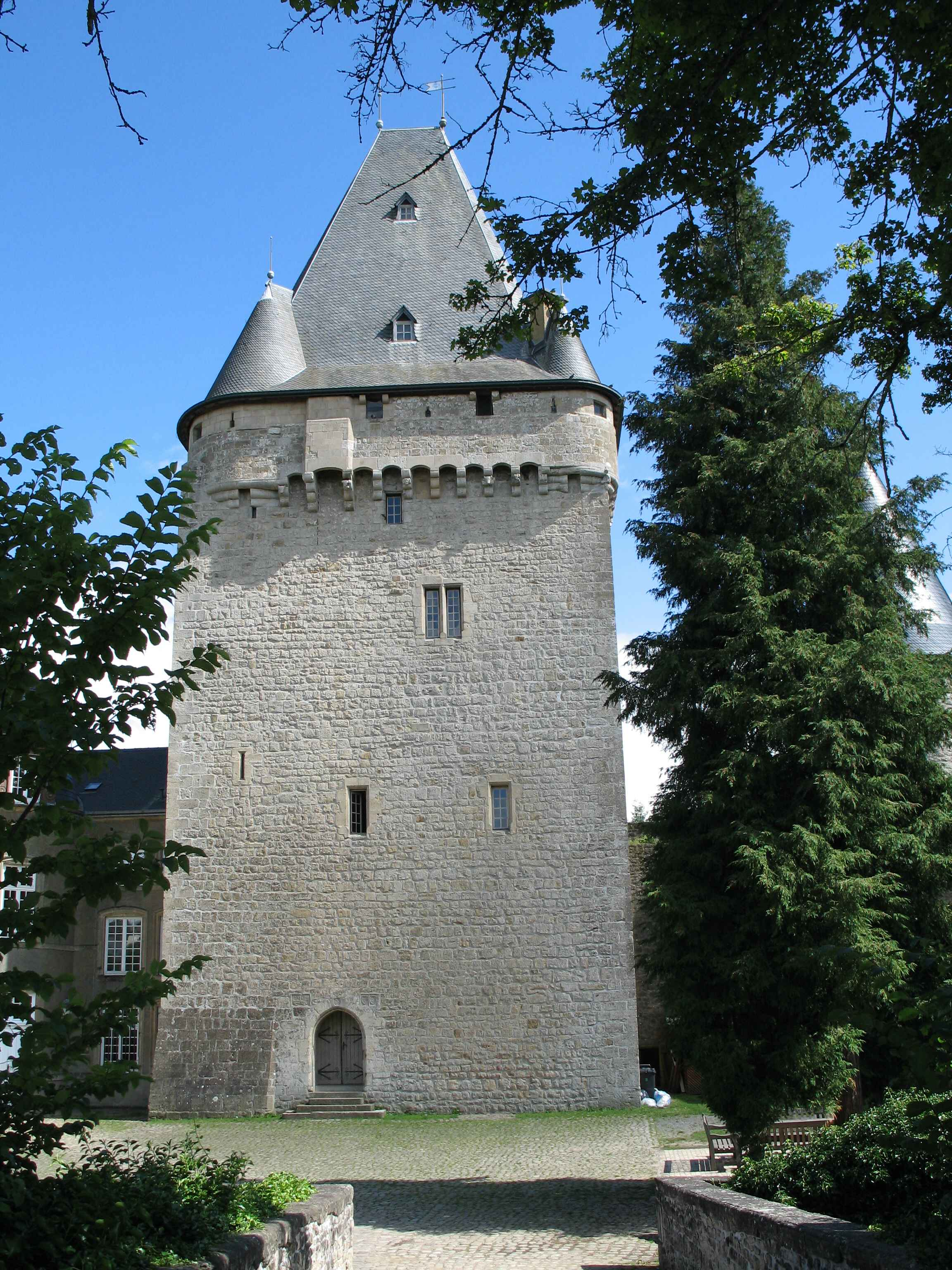 Le château de Hollenfels (Luxembourg)